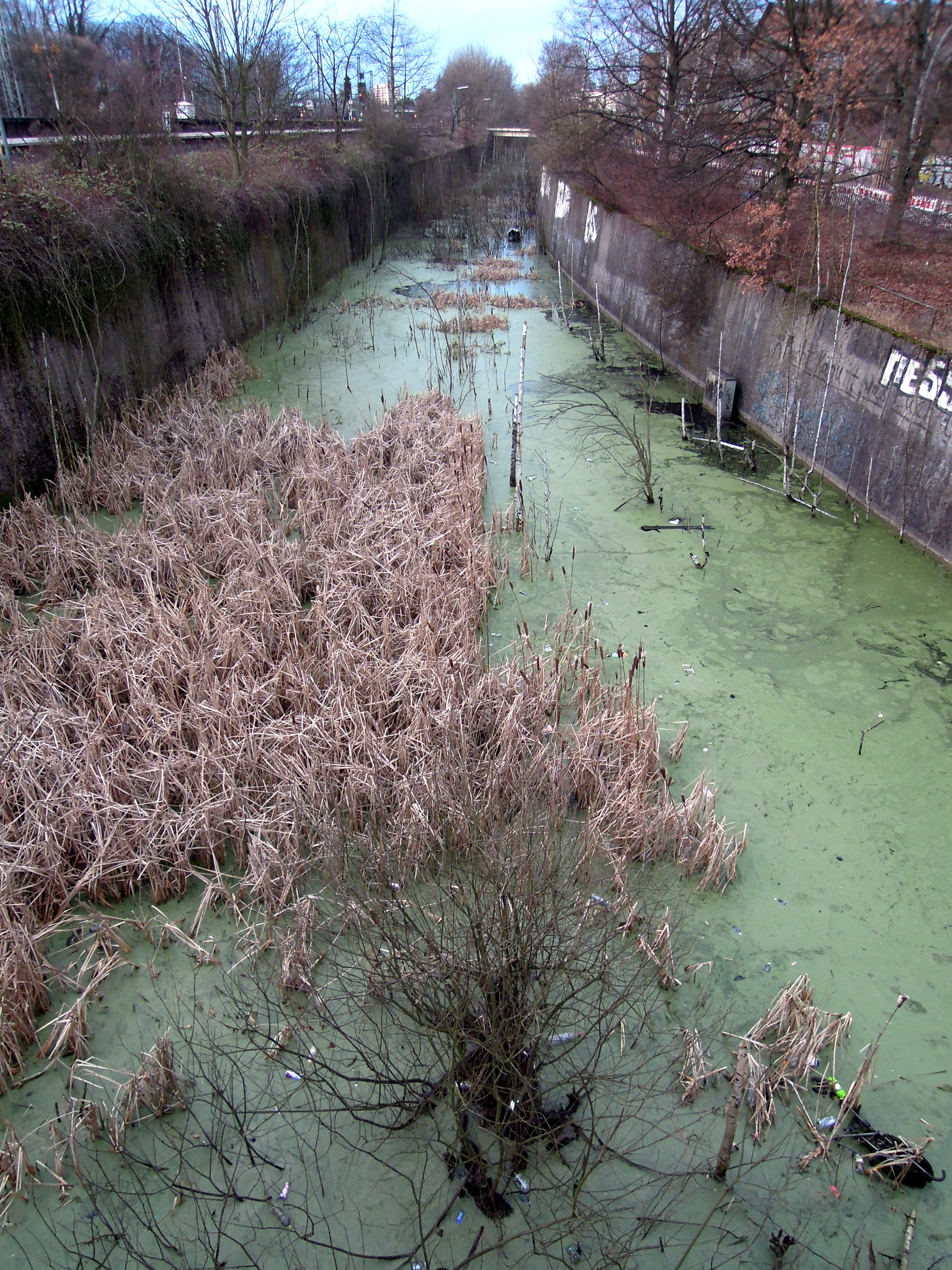 Gewässer unter der Diebsteichbrücke an der S-Bahn Station Diebsteich, Hamburg (02.Februar 2015)